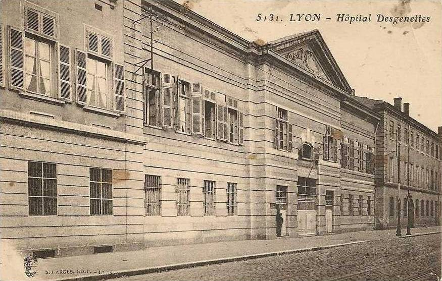 ancien hôpital Desgenettes (hôpital d'instruction des armées de Lyon).